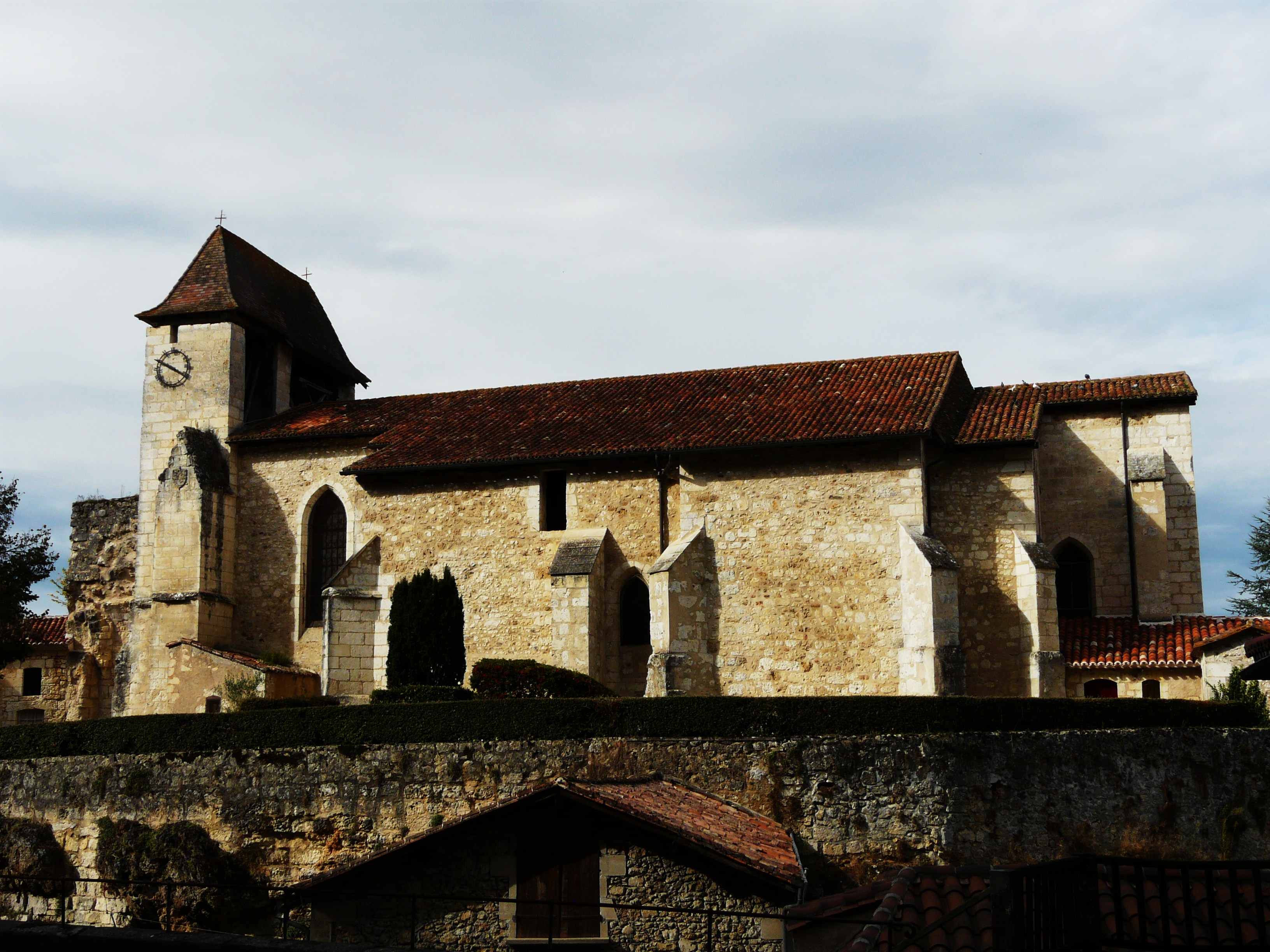 L'église Saint-Pierre et Saint-Paul, Sourzac, Dordogne, France Object location45° 03′ 06″ N, 0° 23′ 46″ E